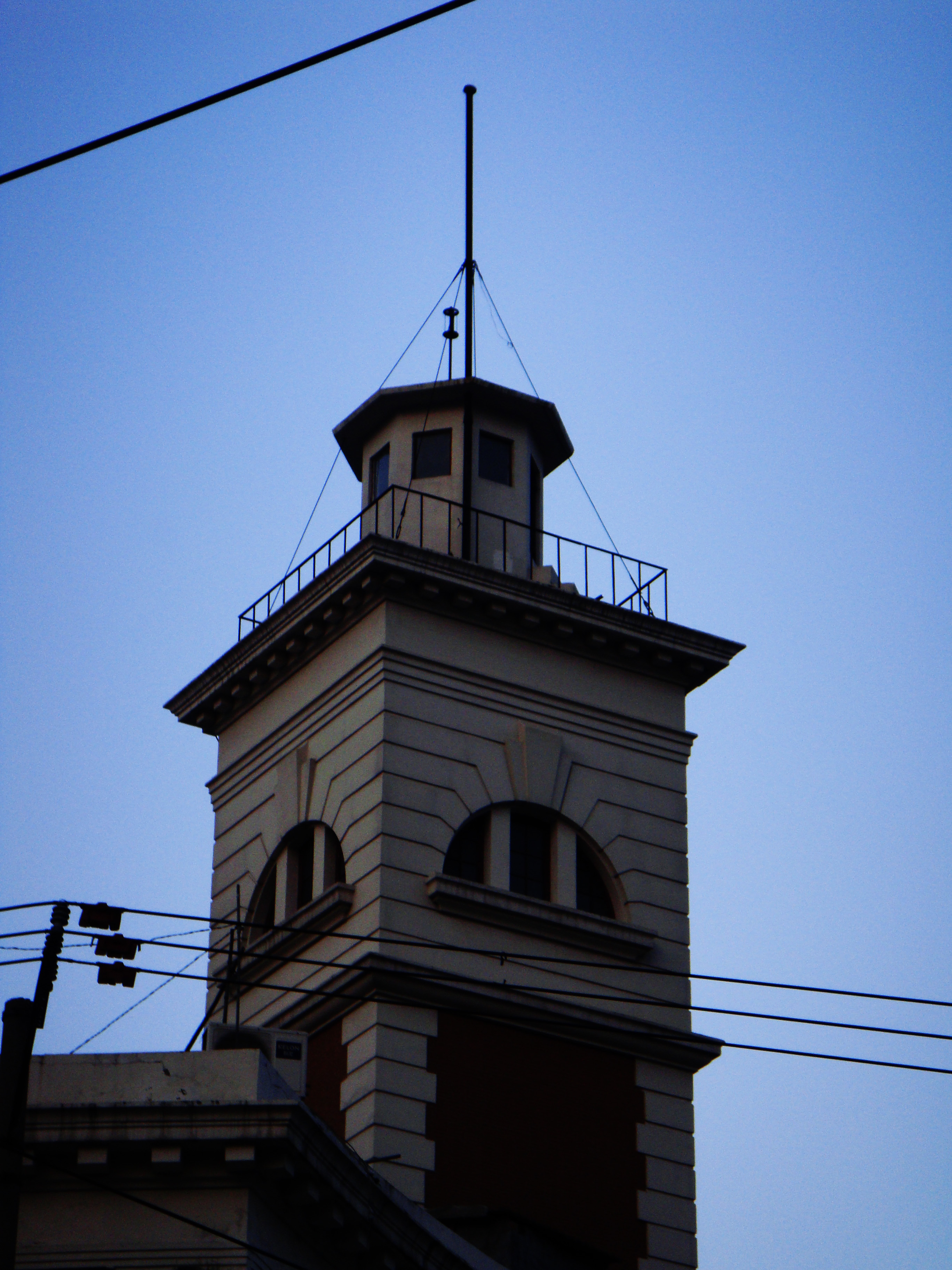 中文（中国大陆）: 虹口救火会塔楼细节